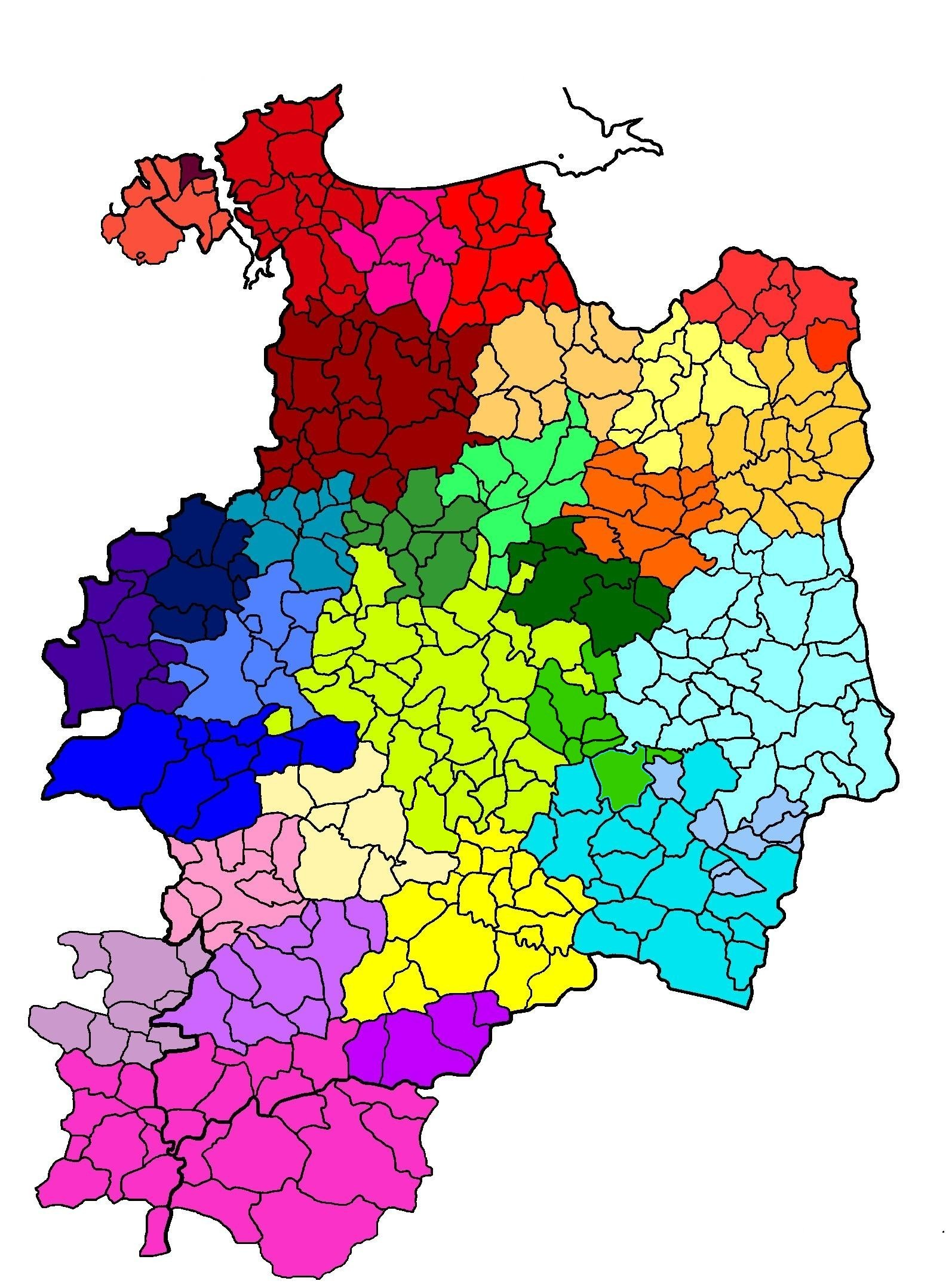 Intercommunalités-d'ille-et-vilaine 01-07-2012